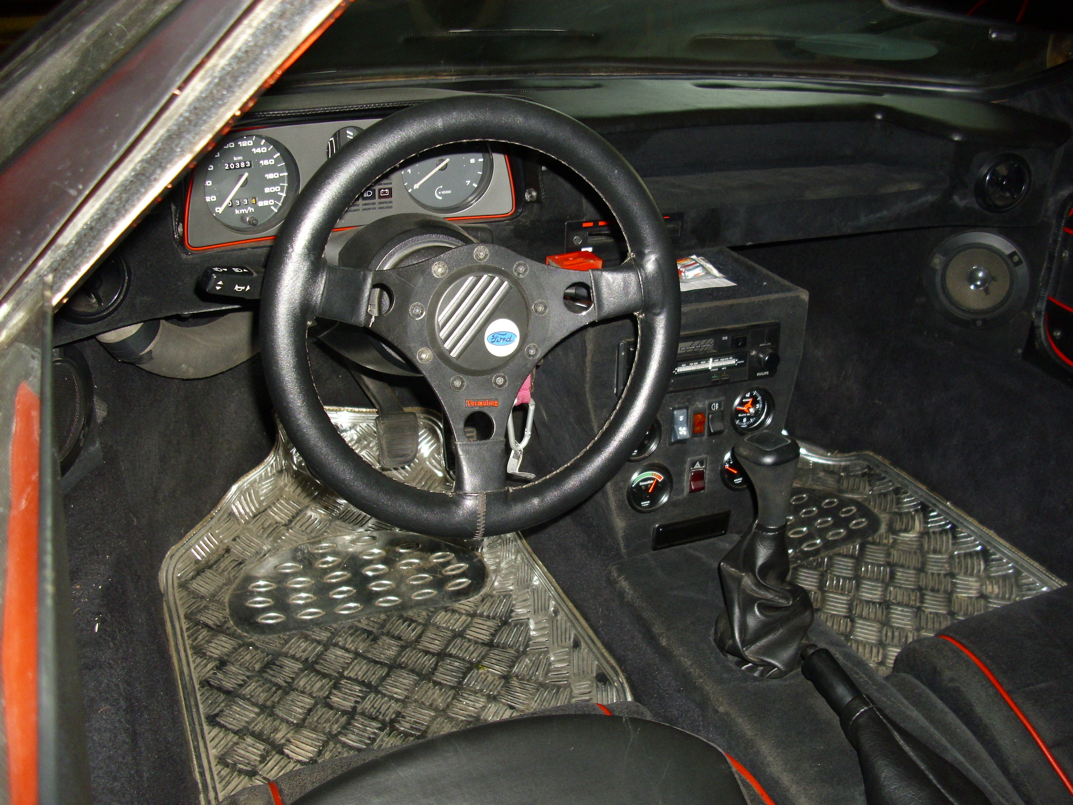 Ledl AS 160 1986 Interieur